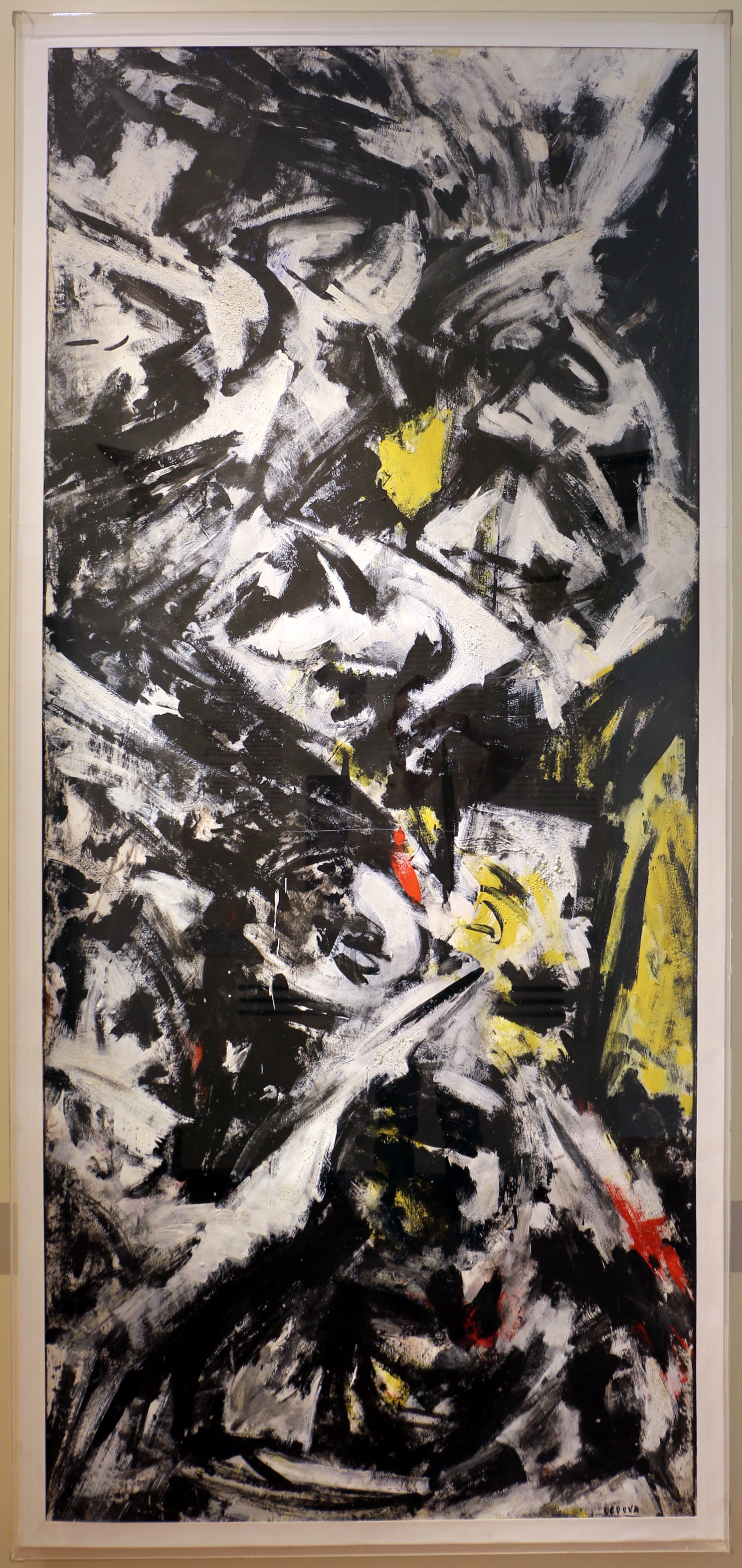 Collezione Mosaici Moderni - NB: Museum explicitly authorized the upload of its contemporary art collection for WLM 2016 (for further info ask WLM Italy organizators). This is a photo of a monument which is part of cultural heritage of Italy.